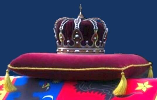 Coroana de oțel a regelui Carol I al României, confecționată în 1881